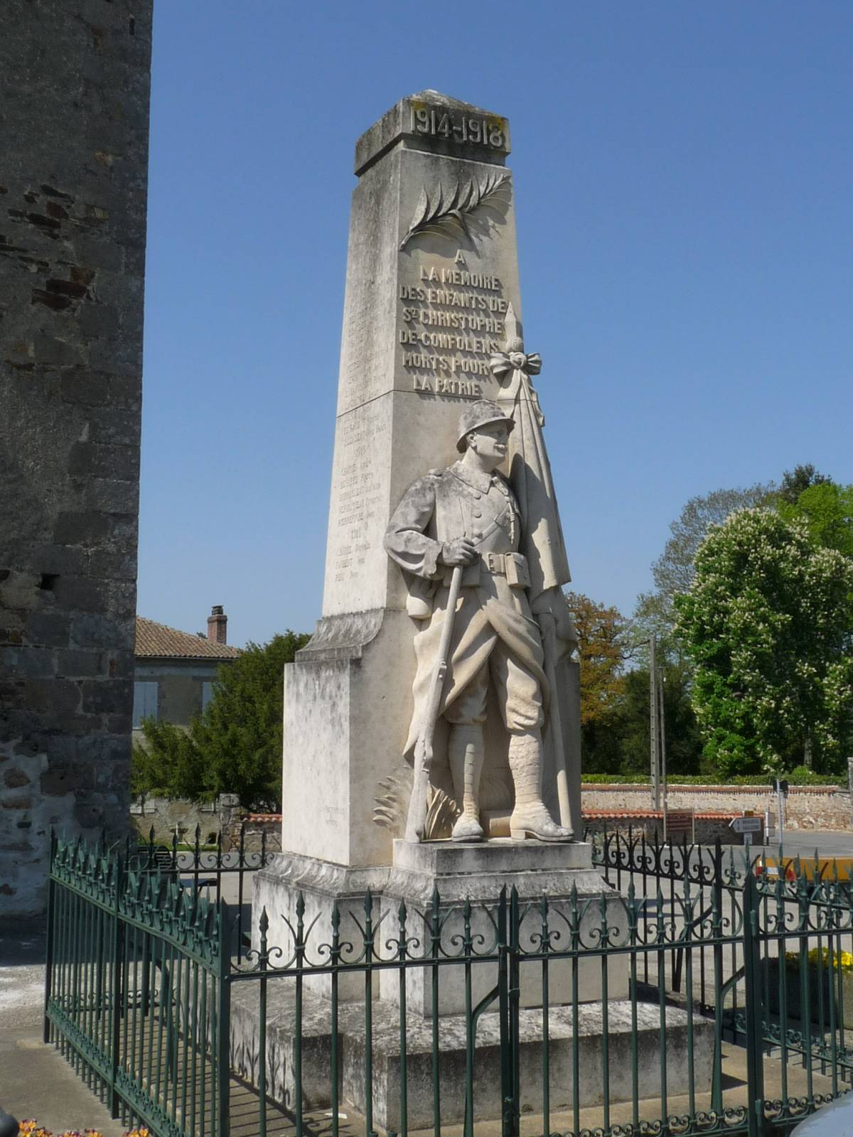 Monument aux morts 1914-18, St-Christophe, Charente, France